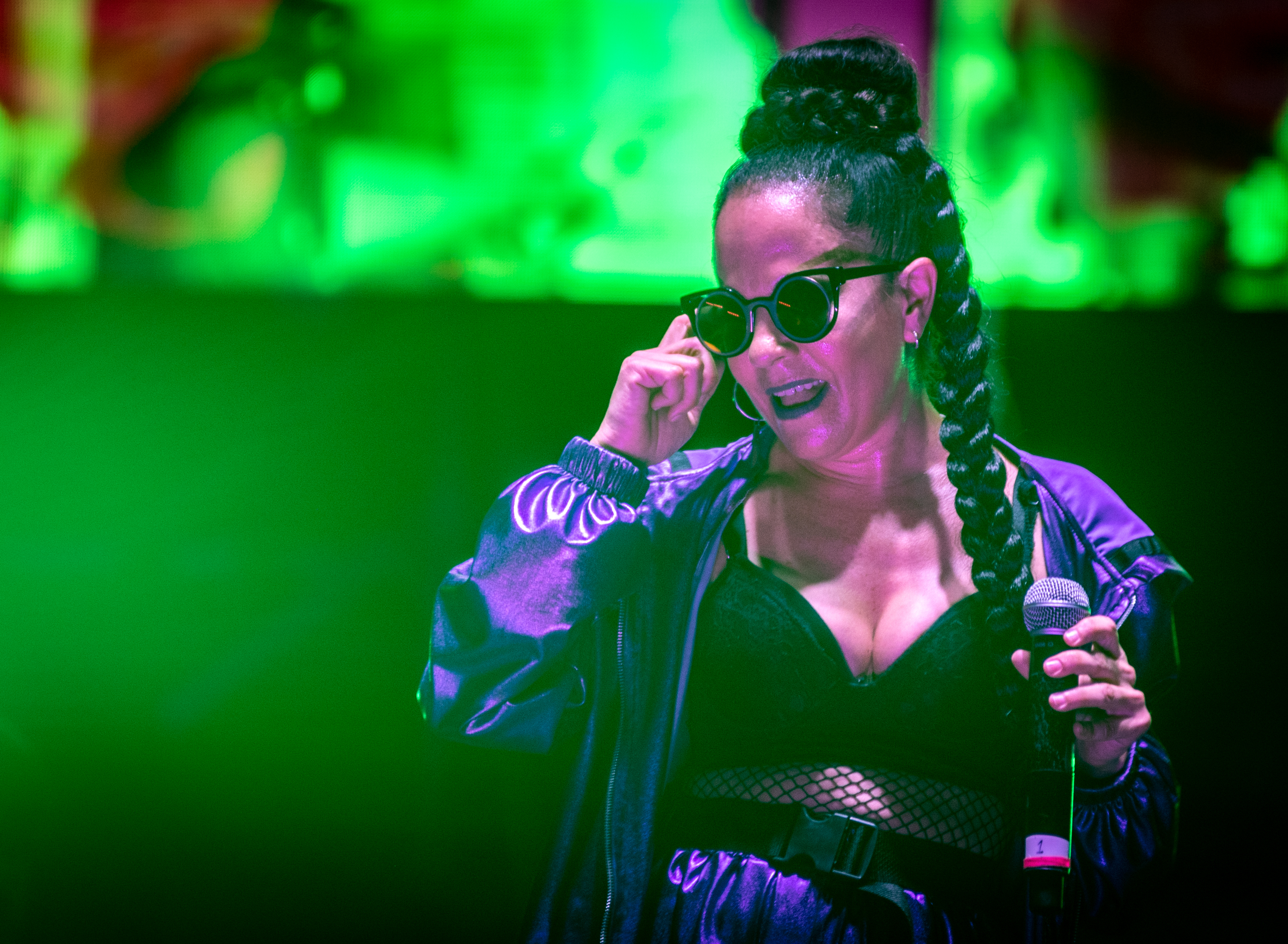 Villa Martenilli, 1 de marzo de 2020._ Más de 500.000 personas se acercaron a Tecnópolis durante estos diez días de Atardeceres con propuestas para todos los gustos y para toda la familia. El broche de oro fue un cierre espectacular que dio inicio a las actividades organizadas por la Semana de las Mujeres Trabajadoras bajo el lema "Nosotras movemos el mundo". La ministra Elisabeth Gómez Alcorta, titular del Ministerio de Mujeres, Géneros y Diversidad, recorríó el predio junto a María Rosenfeldt, directora de Tecnópolis. Fotos Kaloian y Augusto Starita/ Ministerio de Cultura de la Nación.